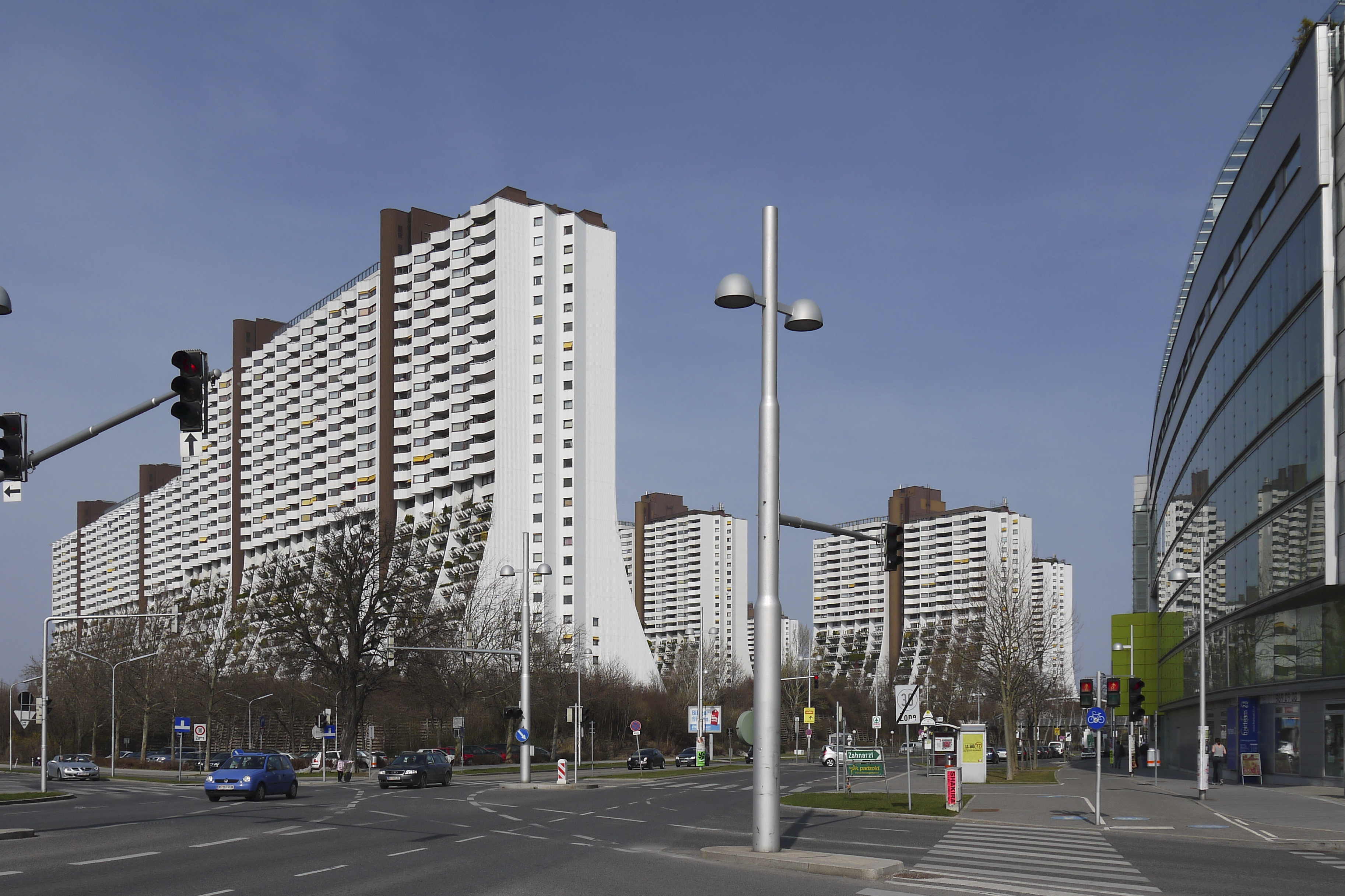 AWohnpark Alterlaa Westseite